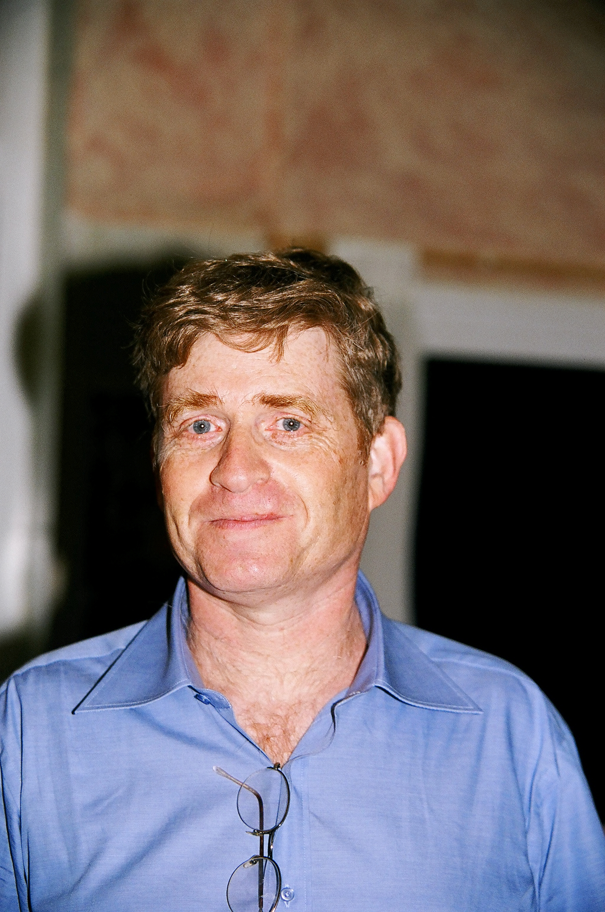 פרופסור ראובן עמיתי